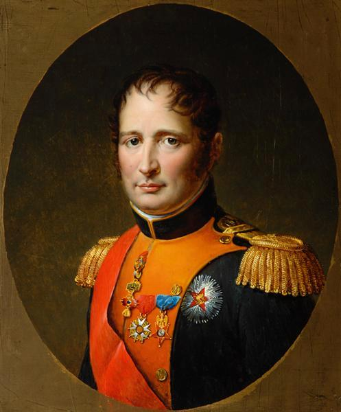 Portrait de Joseph Bonaparte (frère aîné de Napoléon), Roi d'Espagne, en uniforme d'officier espagnol (1768-1844)